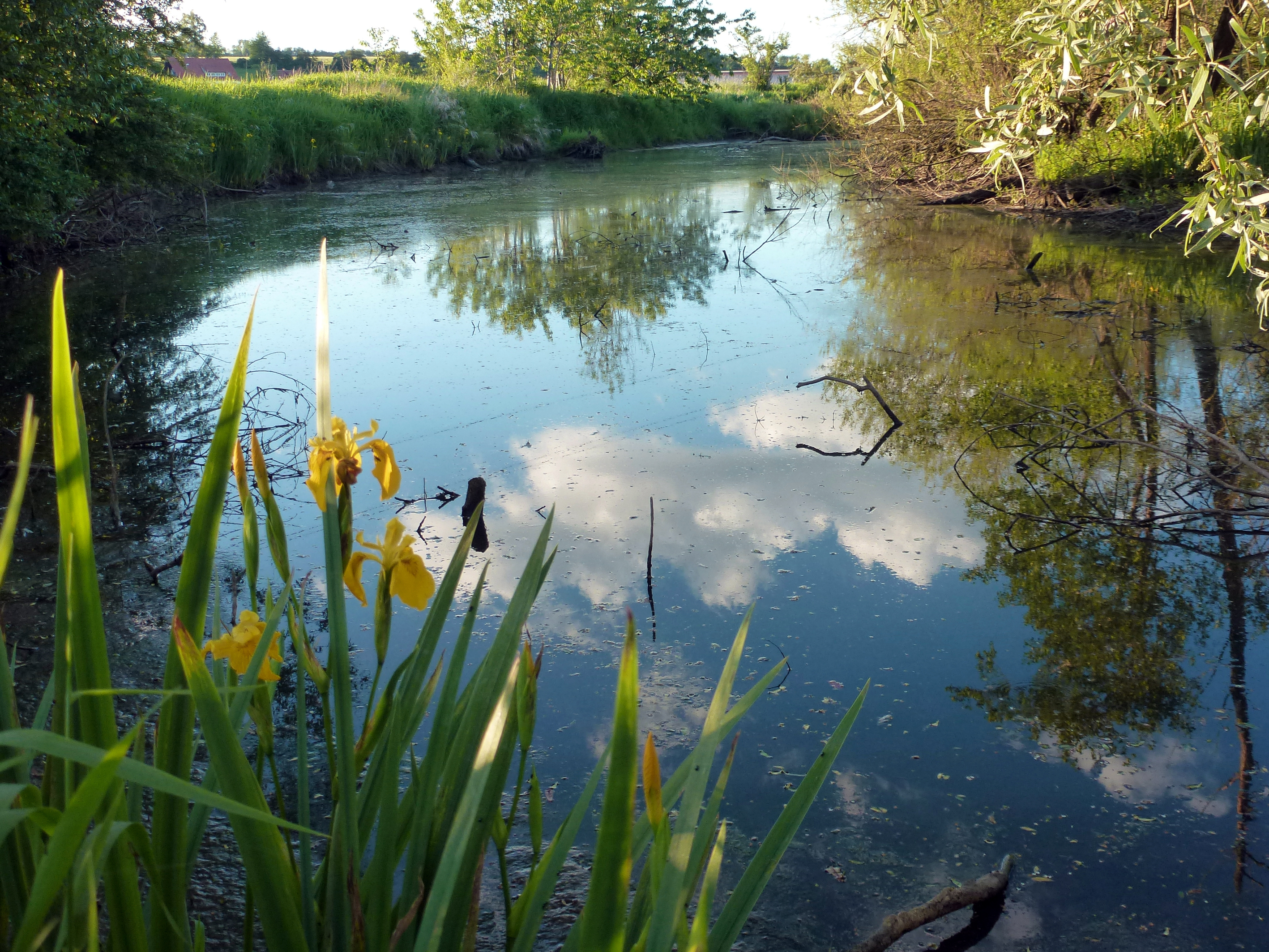 Neusäß-Schlipsheim, Altwasserteich nahe der Schmutter